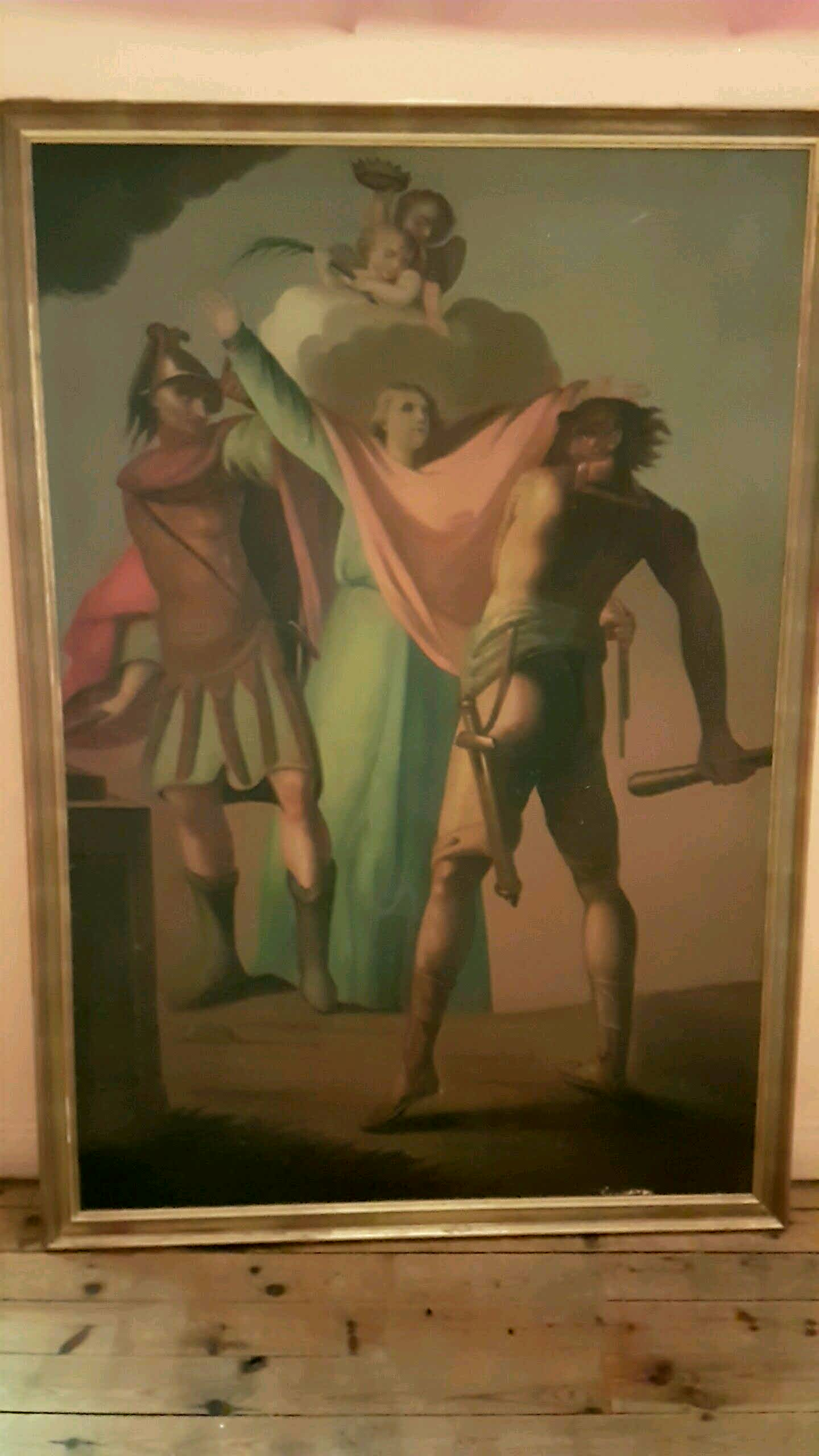 Florine, vierge martyre, agressée (tableau de la fin du XVIIIe siècle ?) - tableau d'Alessandro Scalzi d'après le restaurateur Roland Gaudillière restauré en 1865